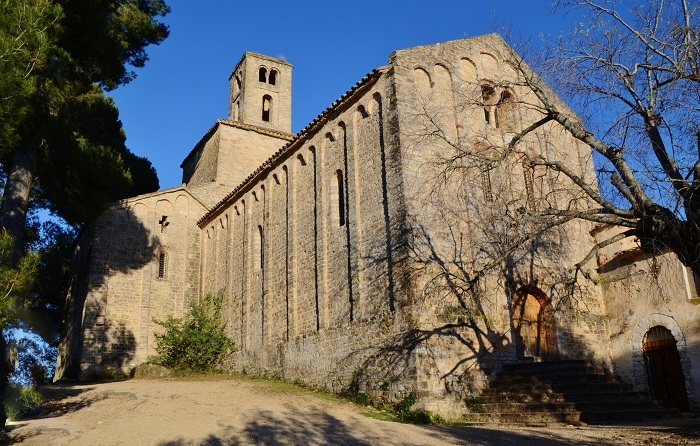 Església de Sant Ponç de Corbera (Cervelló)